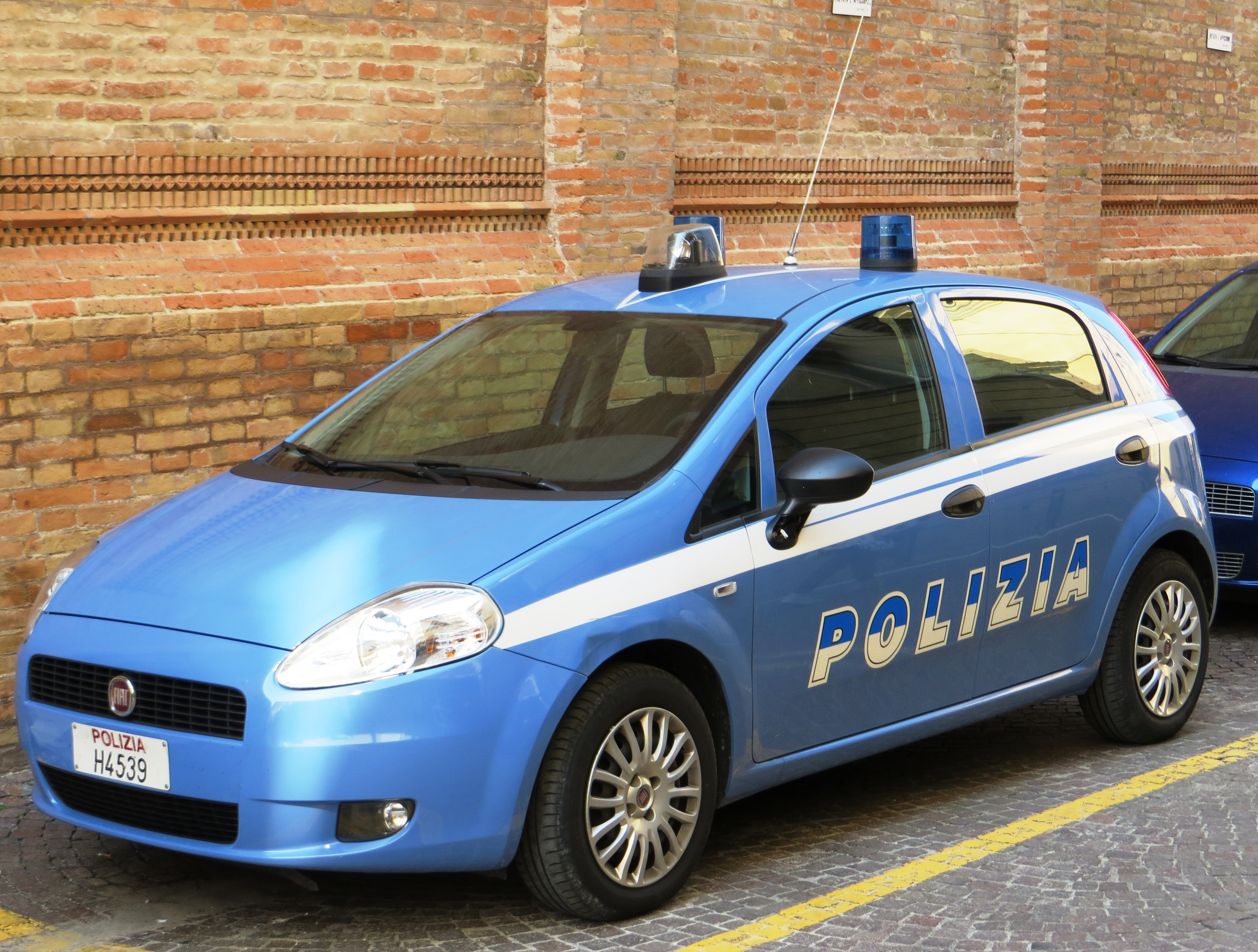 Italiaanse politie auto